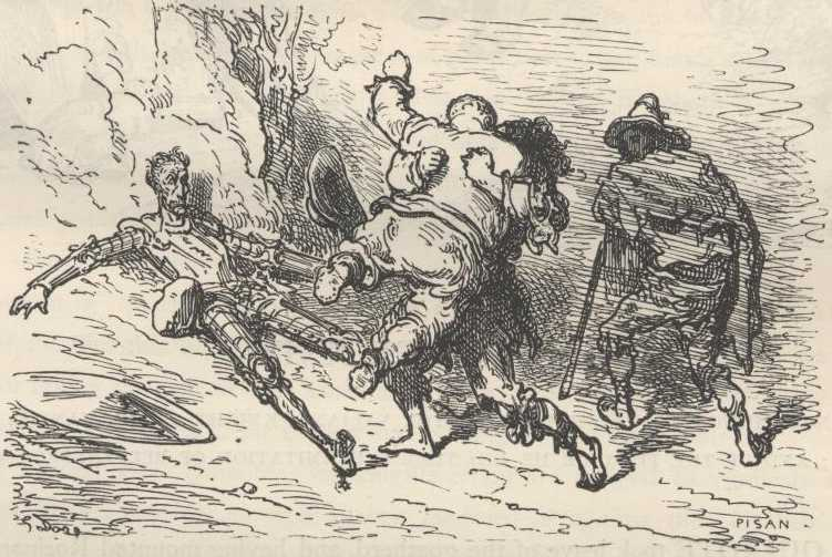 Sancho luta com o Roto da Má Figura, ilustração de Gustave Doré para "Dom Quixote" de Miguel de Cervantes